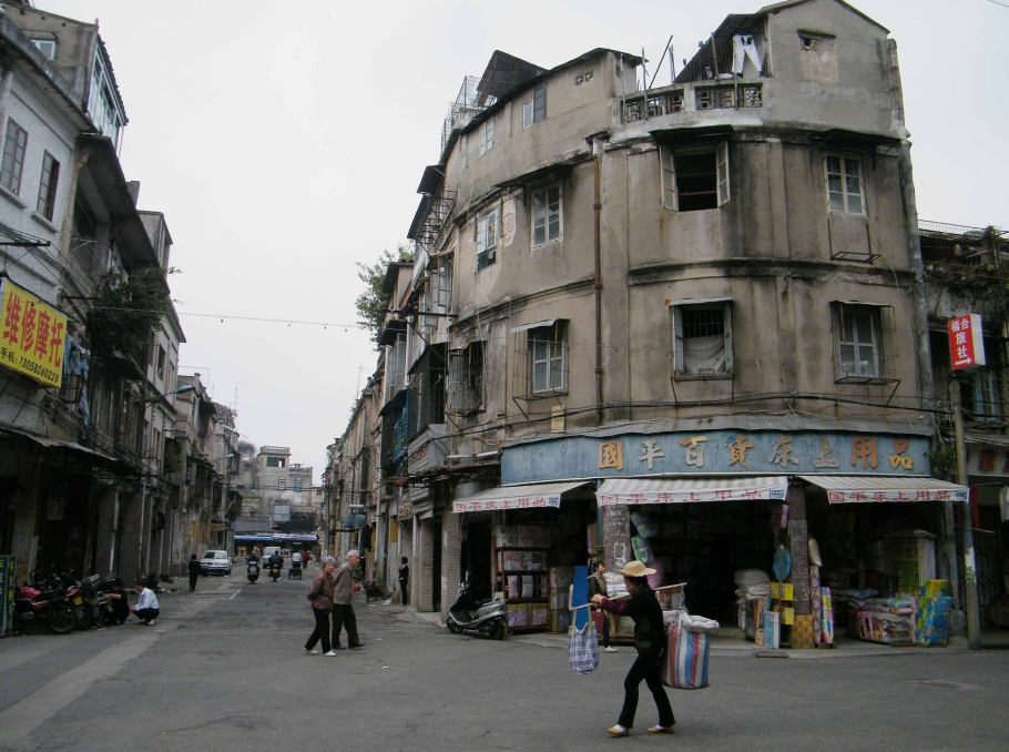 汕头老市区